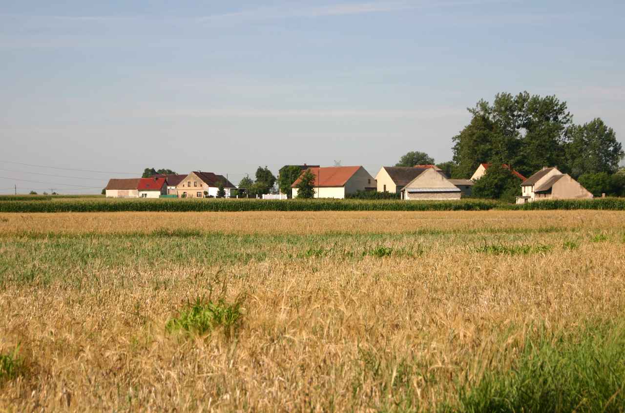 Nowy Młyn (dodatkowa nazwa w j. niem. Neumühle) – przysiółek w Polsce położony w województwie opolskim, w powiecie krapkowickim, w gminie Strzeleczki.